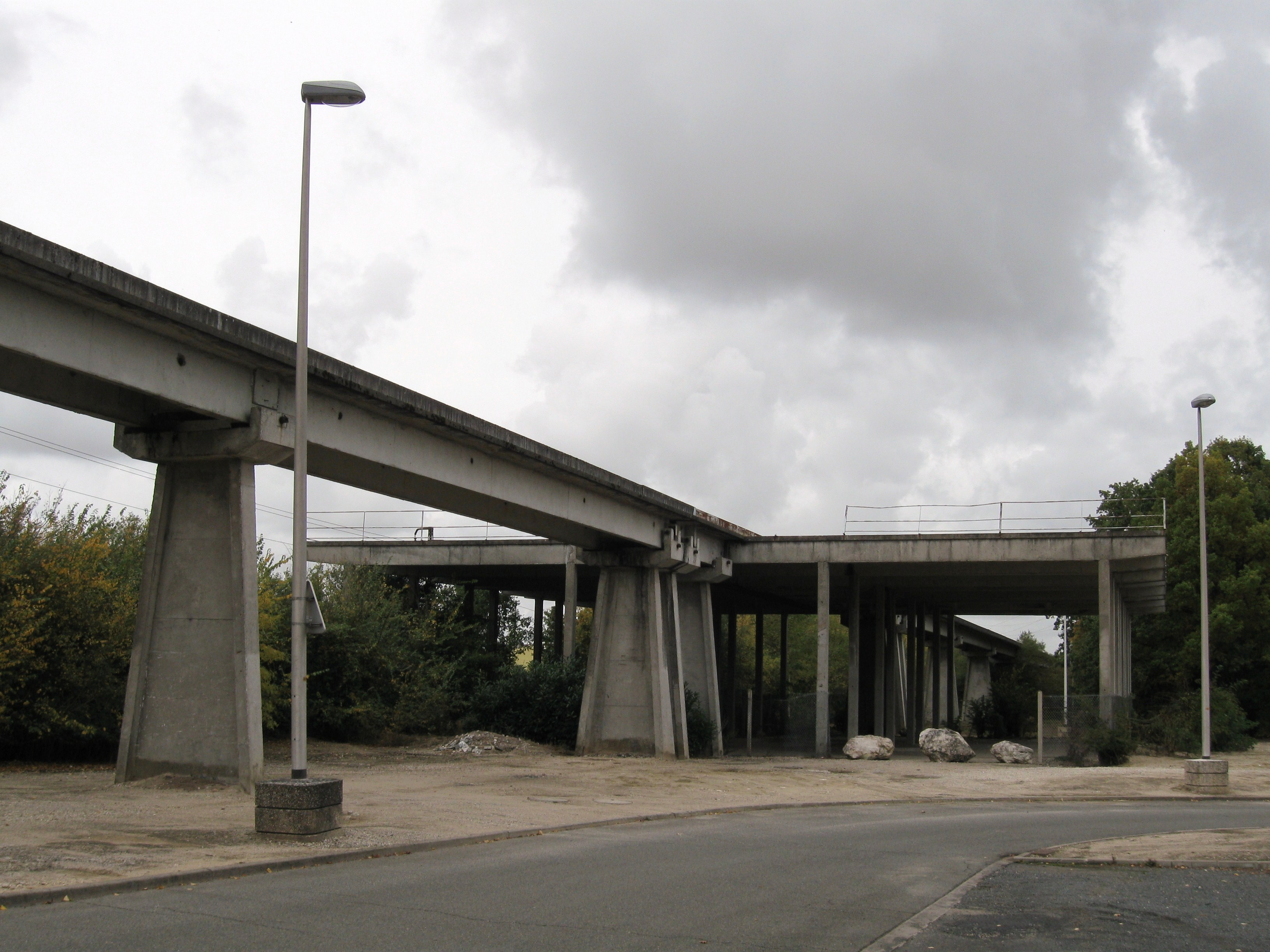 Aire de retournement à l'extrémité sud de la voie expérimentale abandonnée de l'Aérotrain Bertin, Saran, Loiret, Centre, France